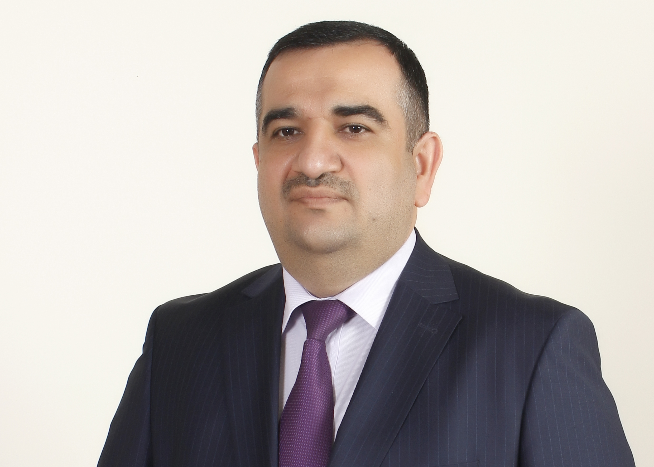 Cavid İsmayıl (tam adı:İsmayıl Cavid Əjdər oğlu; 1 iyun 1972, Çomaxtur, Naxçıvan MSSR) — Azərbaycan iqtisadçısı, hüquqşunas. İqtisad üzrə fəlsəfə doktoru